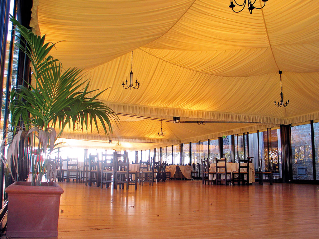 Gazebo in alluminio con drappi e controsoffitto in tessuto prodotto da Giulio Barbieri S.p.A.